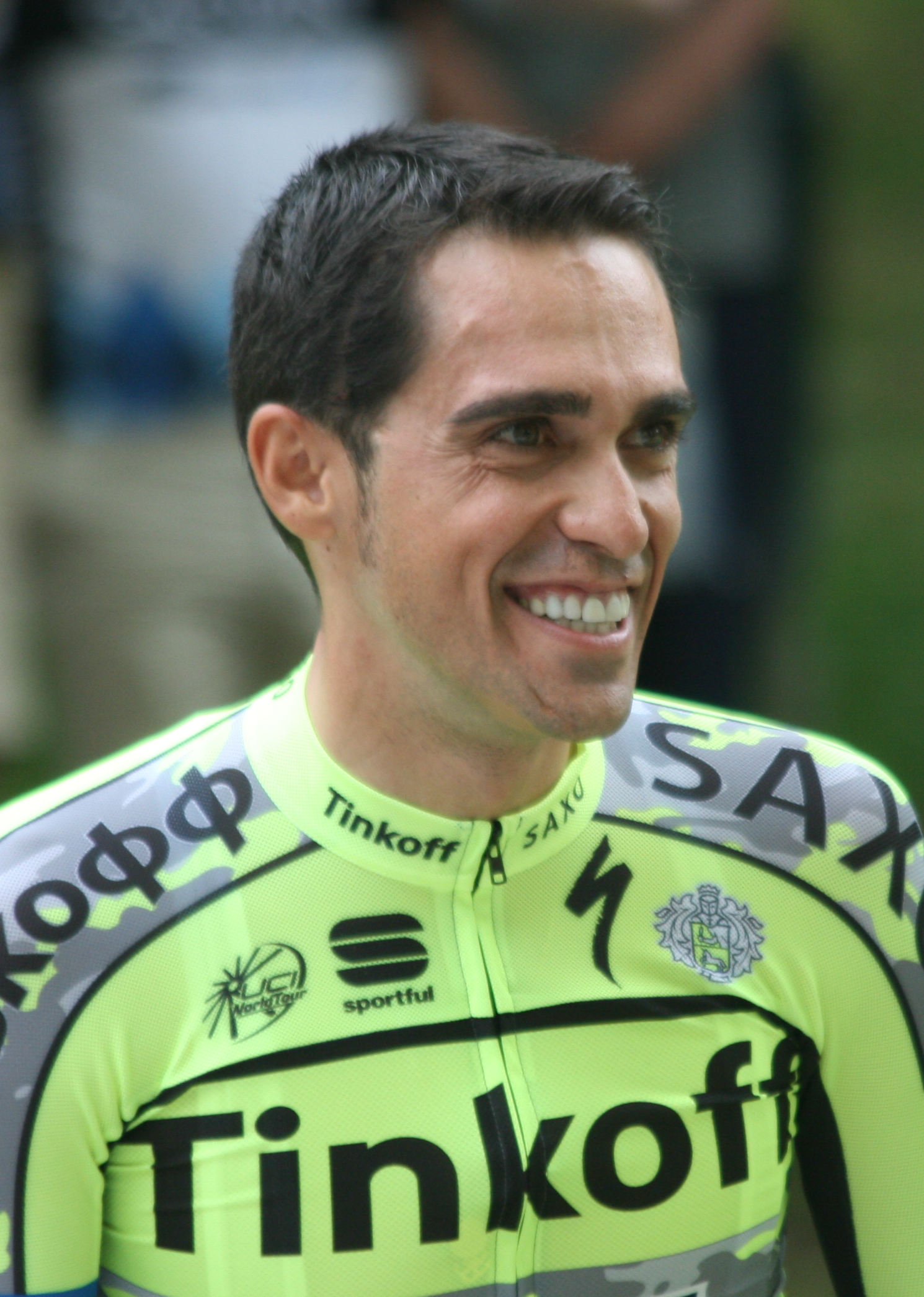 ploegenpresentatie Tour de France 2015 Utrecht